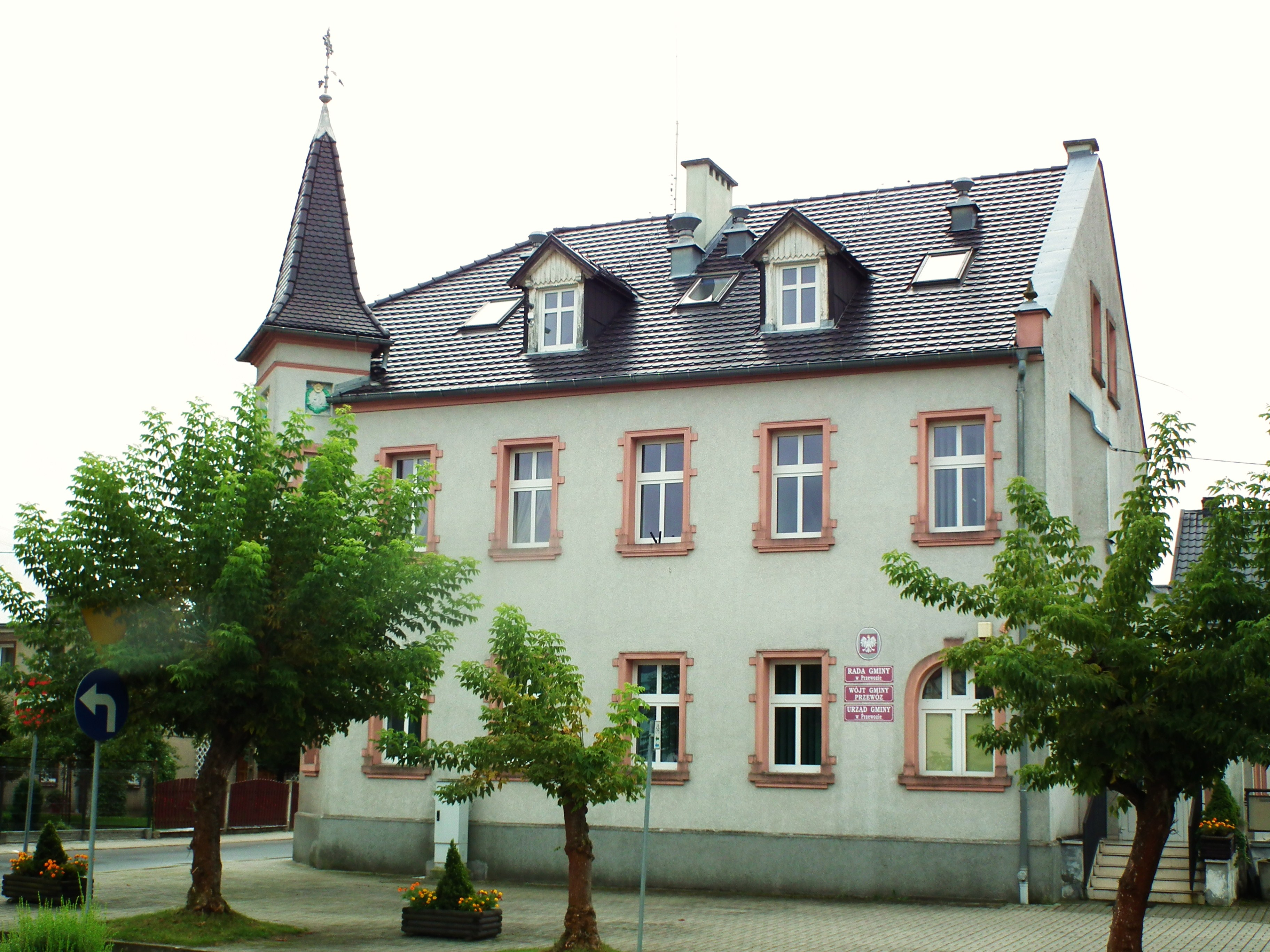 Przewóz w pow. żarskim. Dawne miasto. Urząd Miasta i Gminy.